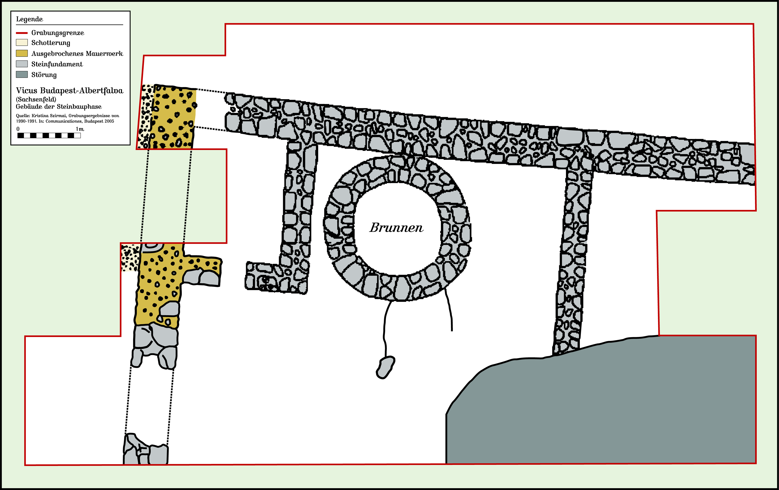 Steinbau unbekannter Nutzung aus dem Vicus des Kastells Budapest-Albertfalva, Ungarn. Grabungskampagne 1990-1991 unter Kristina Szirmai. Quelle: New archaeological Data to the Research of the Albertfalva vicus (1990-1991) In: Communicationes archeologicae Hungariae 1994. Népművelési Propaganda Iroda, Budapest 2005, S. 34, 50–51.